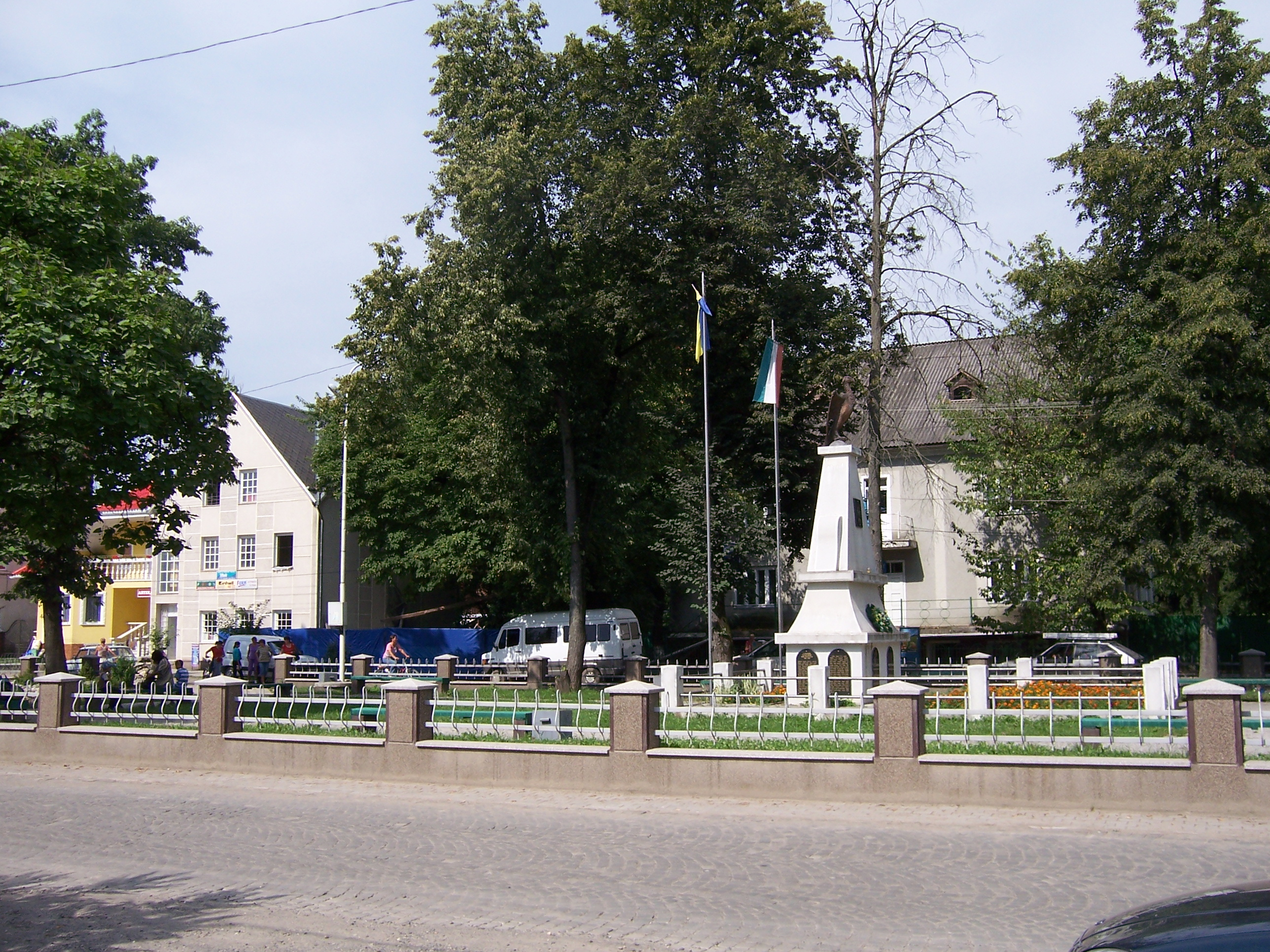 Парк центральная часть